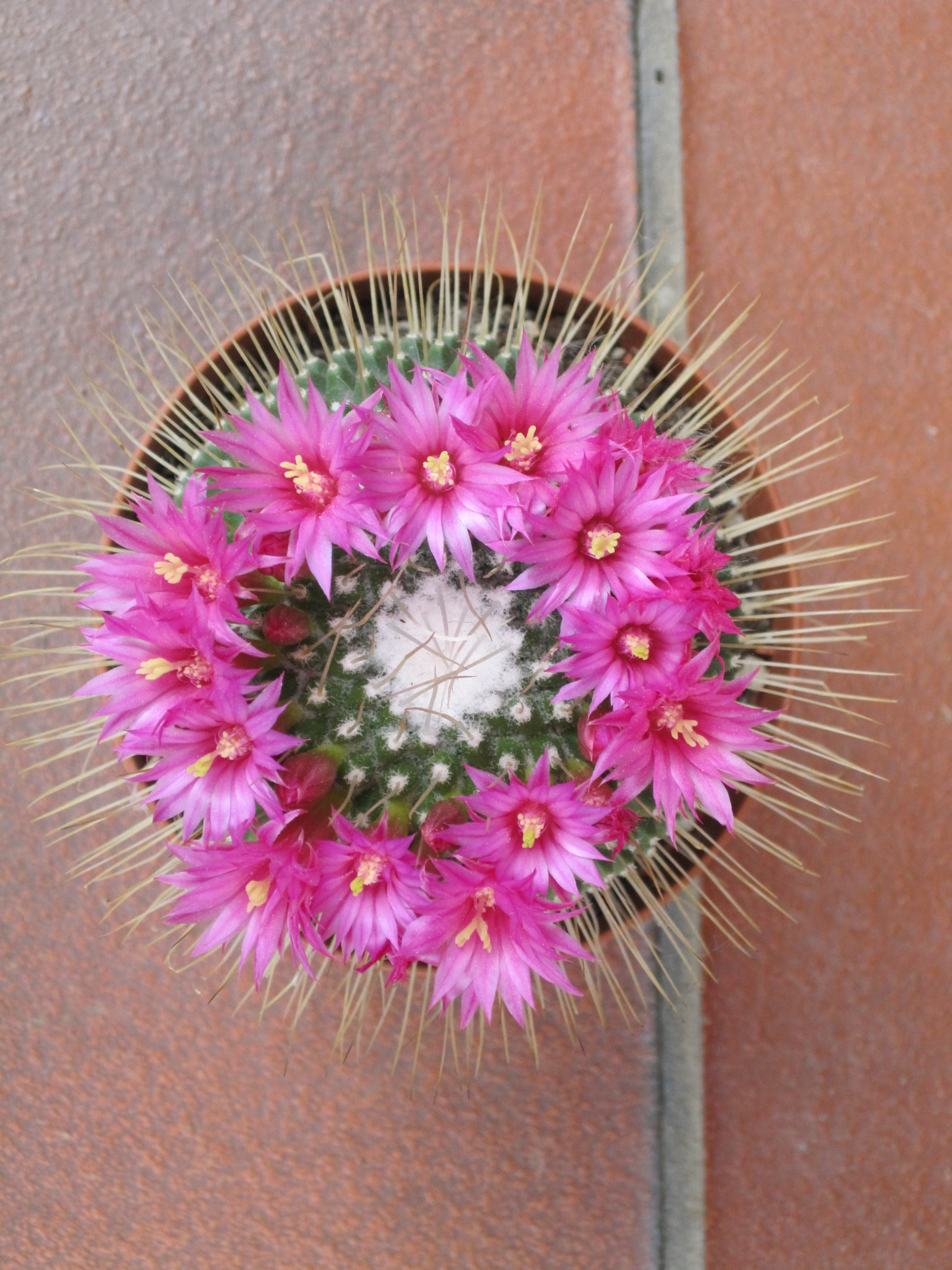 Mammillaria spinosissima cv. un pico in piena fioritura